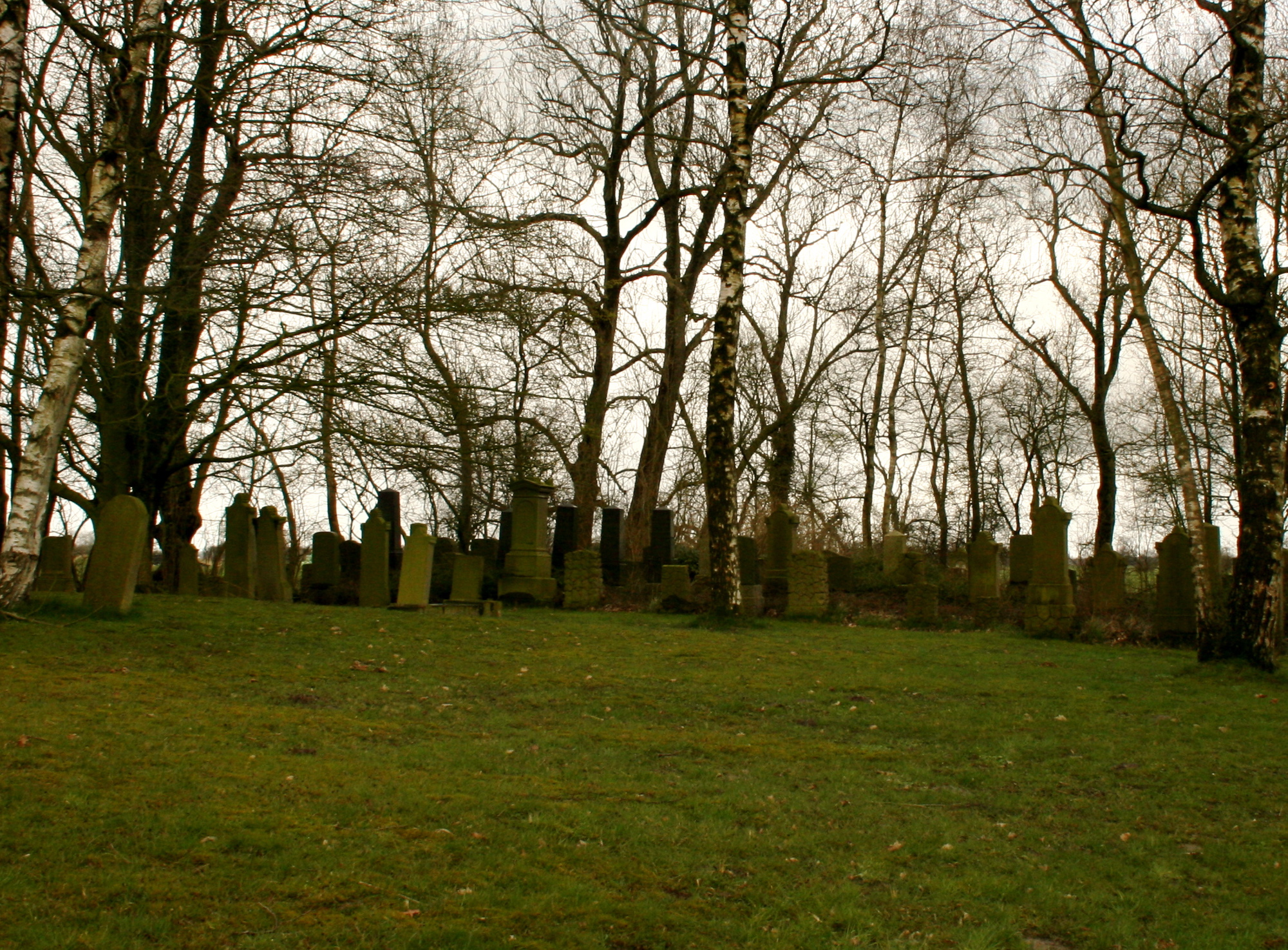 jewish cemetary in Neustadtgödens1